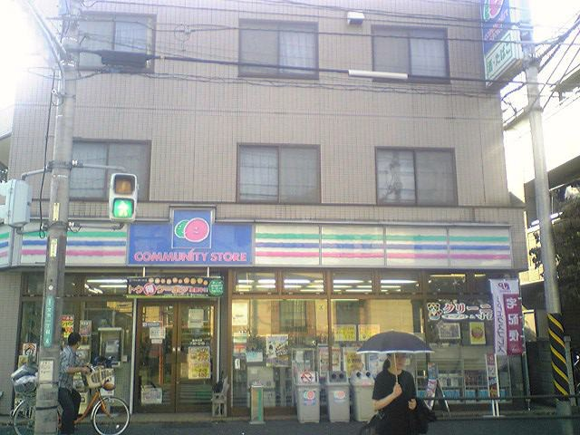 コミュニティ・ストア 文京せきの店